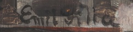 Signatura Emila Filly na obrazu Pařížské zátiší